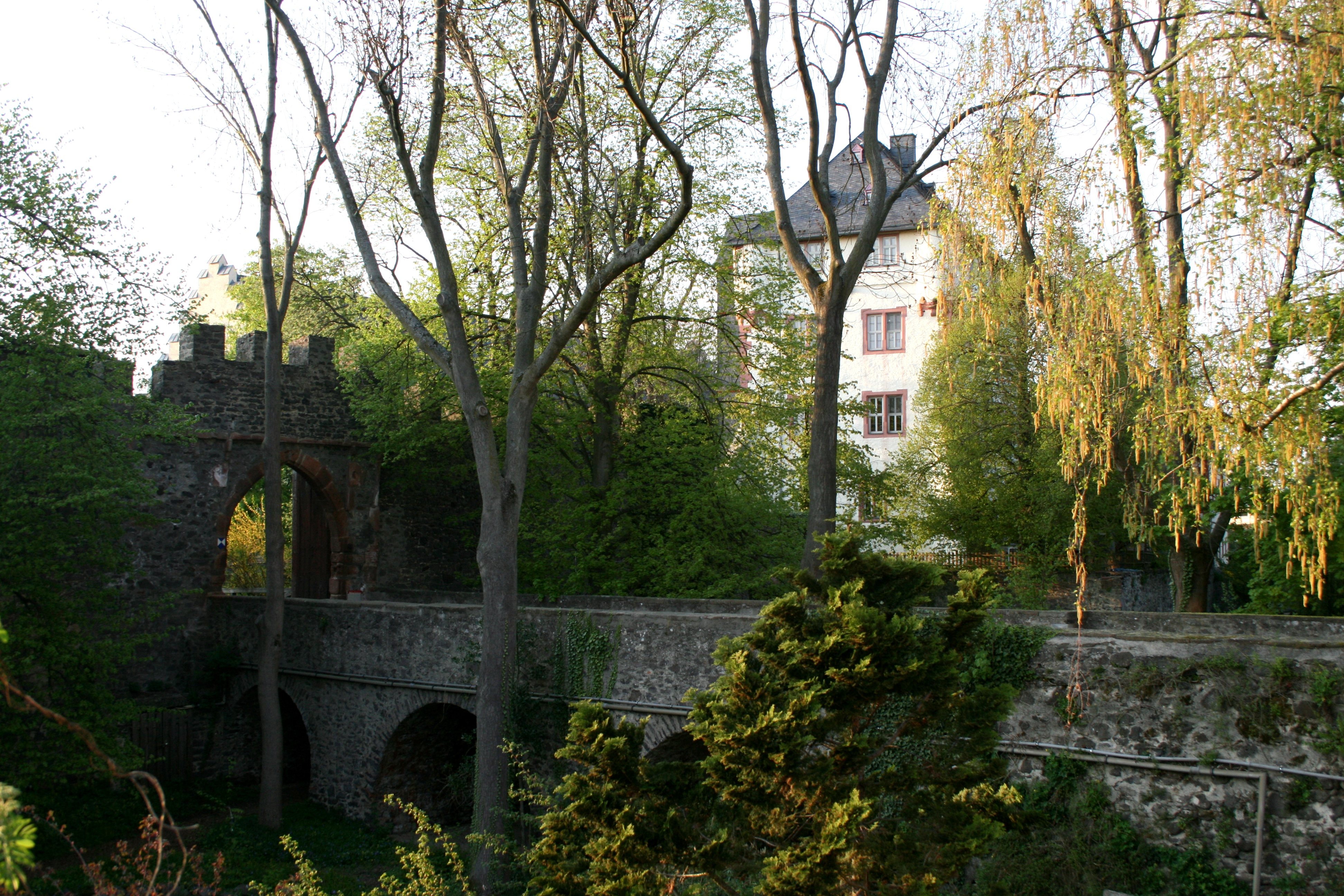 Schloss Bingenheim, Echzell, Wetteraukreis, Hessen, Ansicht des Tores zur Vorburg mit Hohem Bau im Hintergrund.